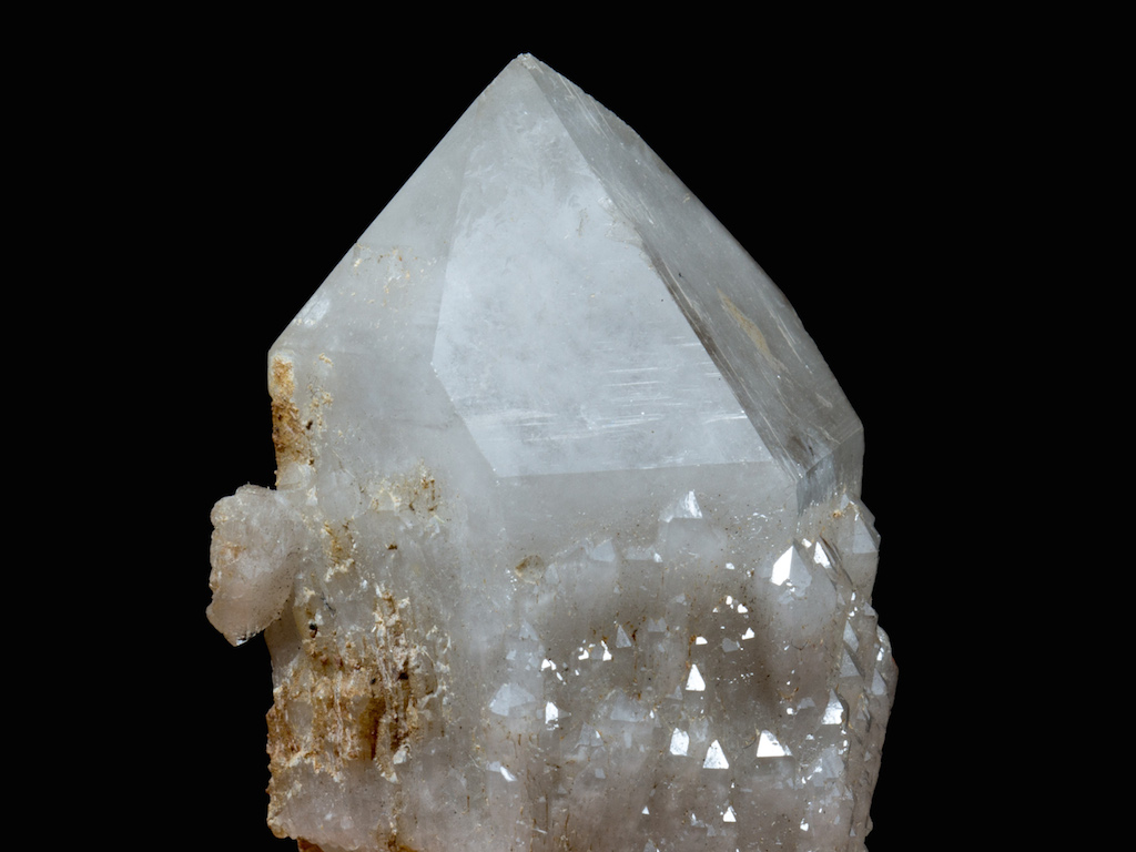 Quars d'Arbúcies, Selva, Girona, Catalunya Mides: 4 x 2.9 x 2.5 cm.